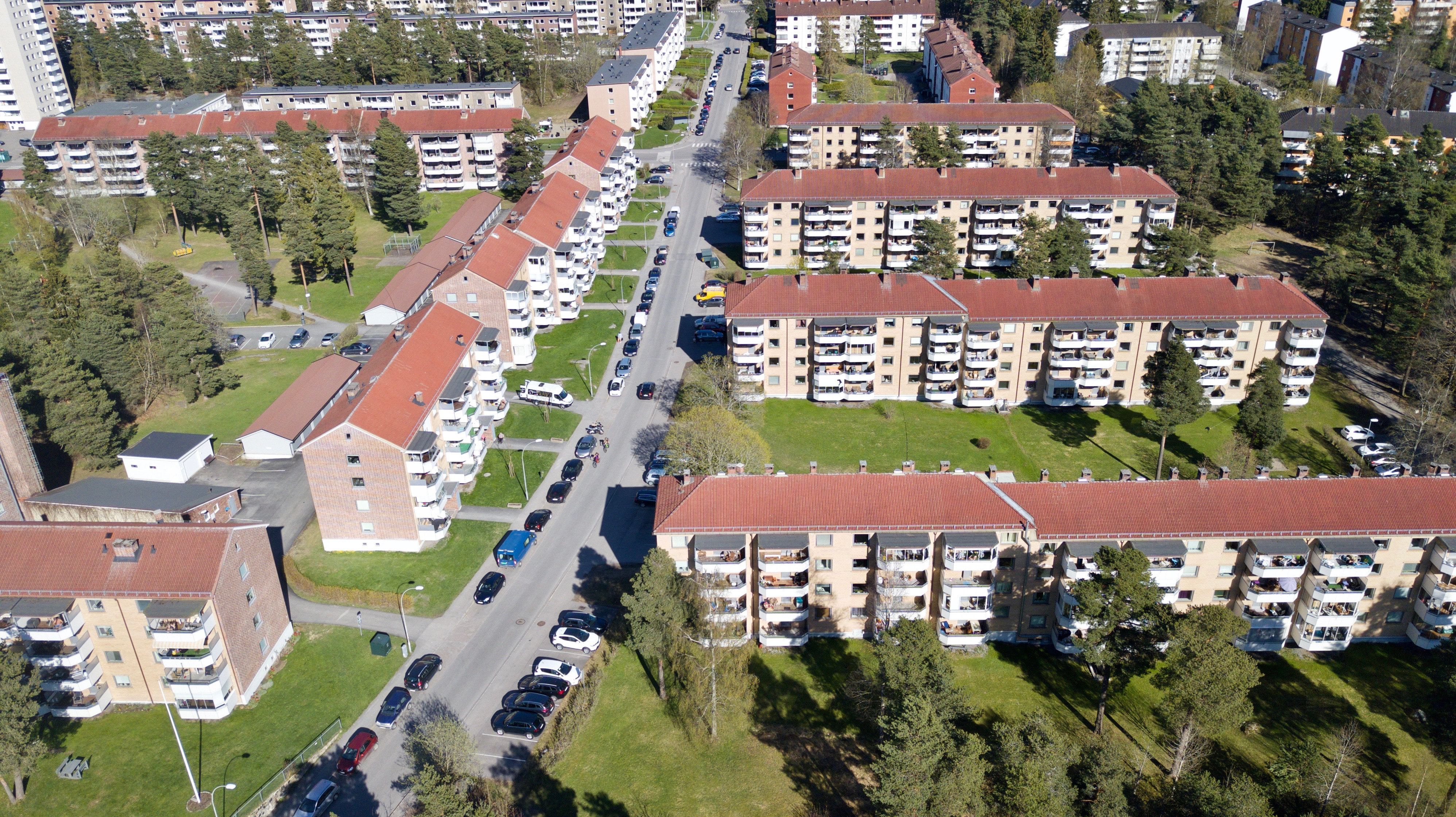 Solbergliveien. Oppsal i Oslo.